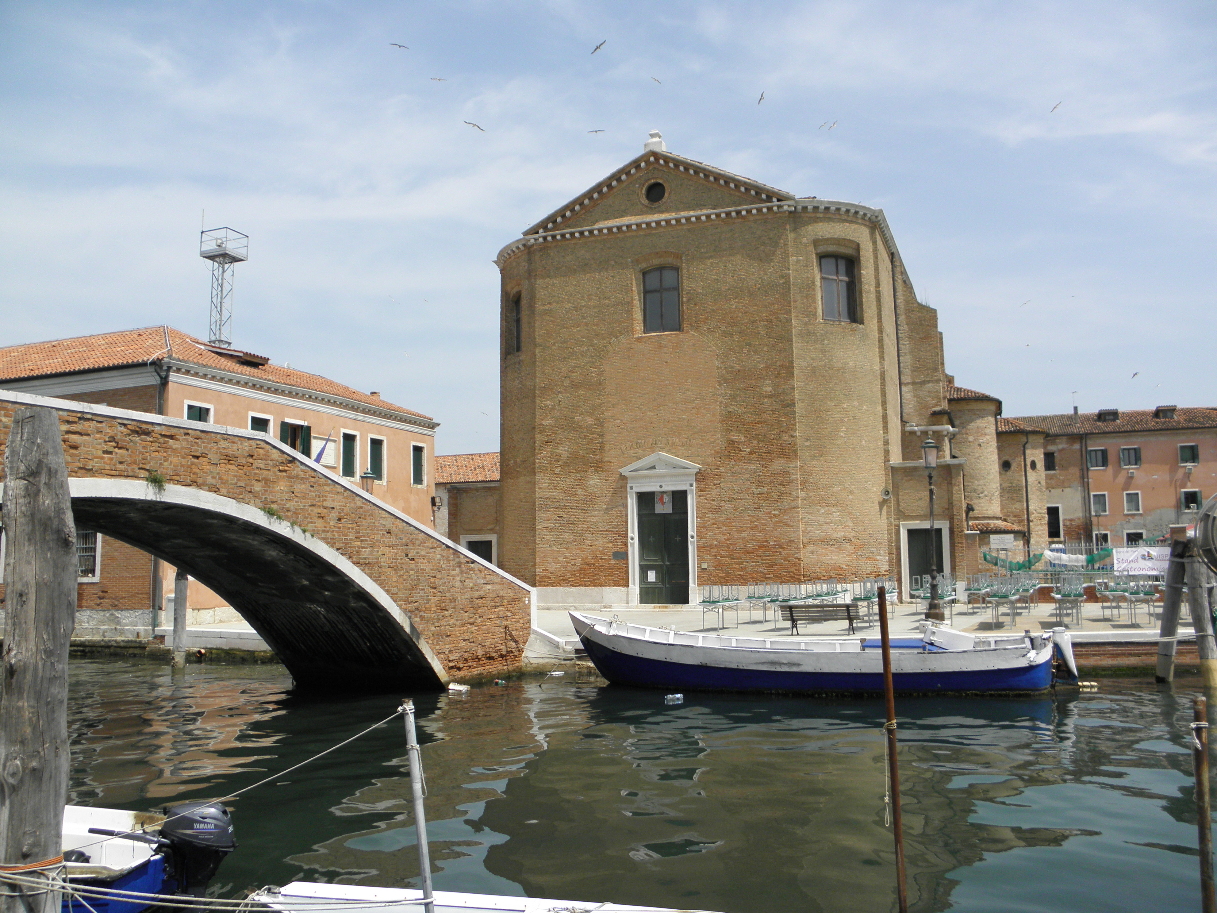 Chioggia: Ponte San Domenico, sull'omonimo canale, e la chiesa parrocchiale di San Domenico.